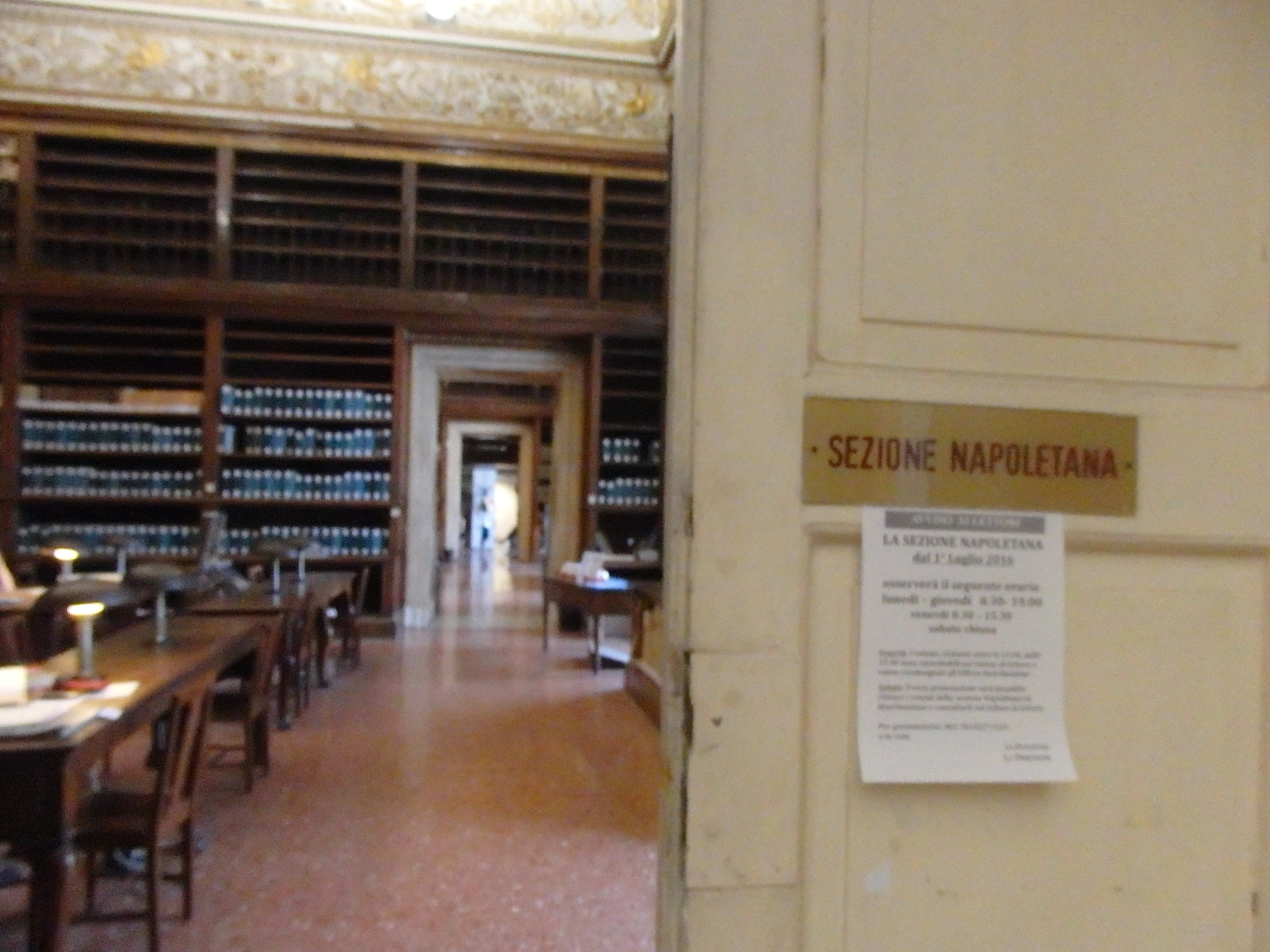 Ingresso e interni della biblioteca nazionale di Napoli.